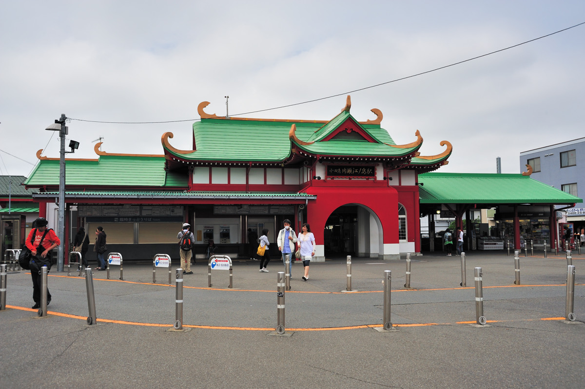 小田急 片瀨江之島車站